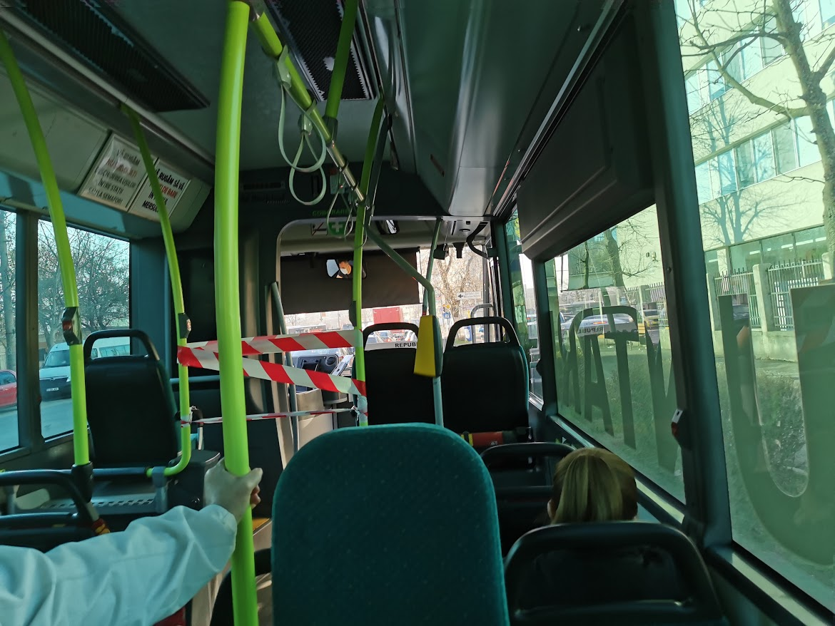 Autobuz STB cu interdicție pentru călători în zona șoferului. Se poate vedea în oglindă șoferul care poartă mască.